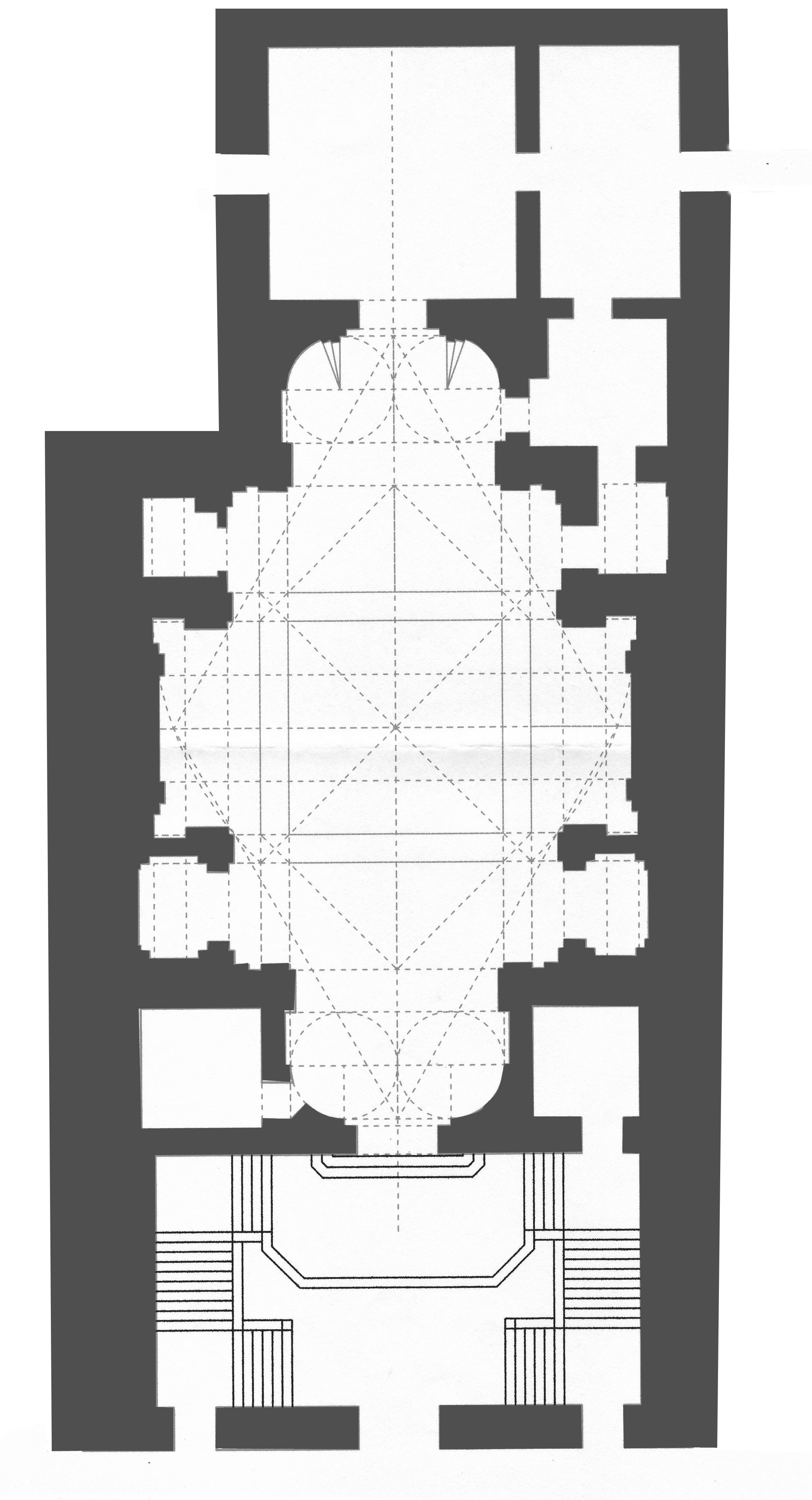 Pianta e geometrie generative della chiesa di San Giuseppe delle Scalze a Pontecorvo.